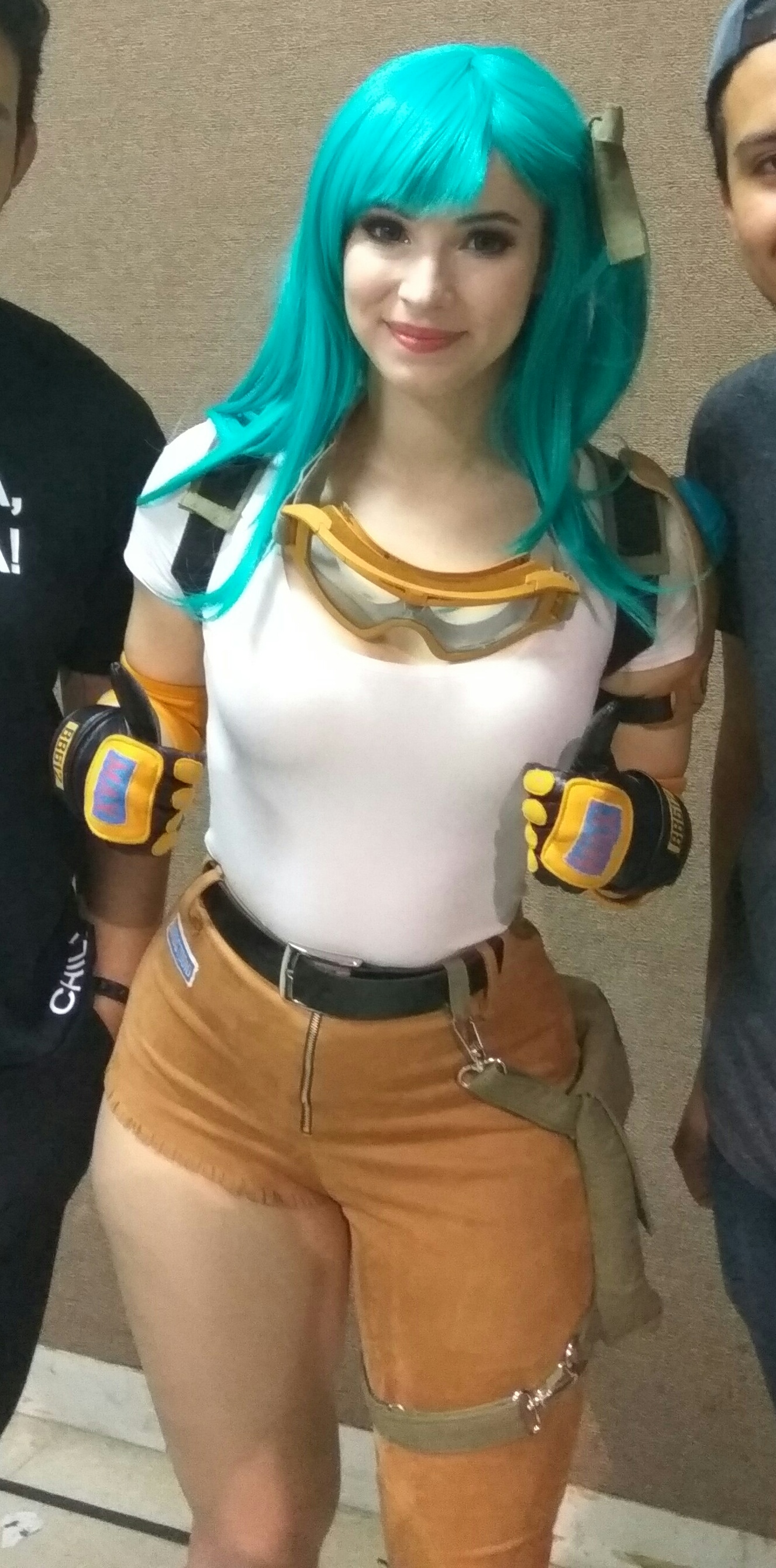 Cosplay del personaje de la serie Dragon Ball, Bulma.